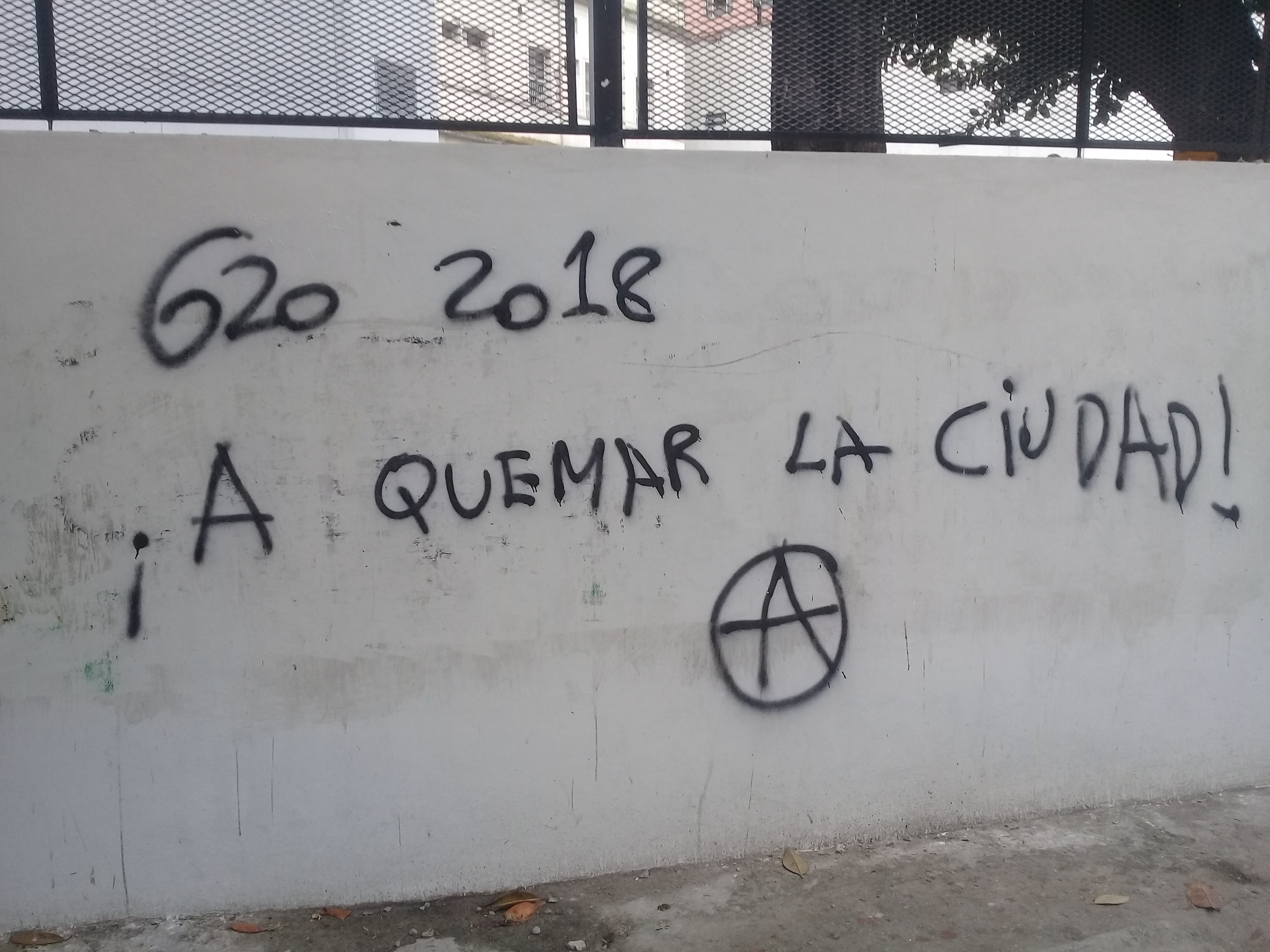 Grafiti en una pared de Buenos Aires, realizado en los días previos a la cumbre del G20 en Argentina